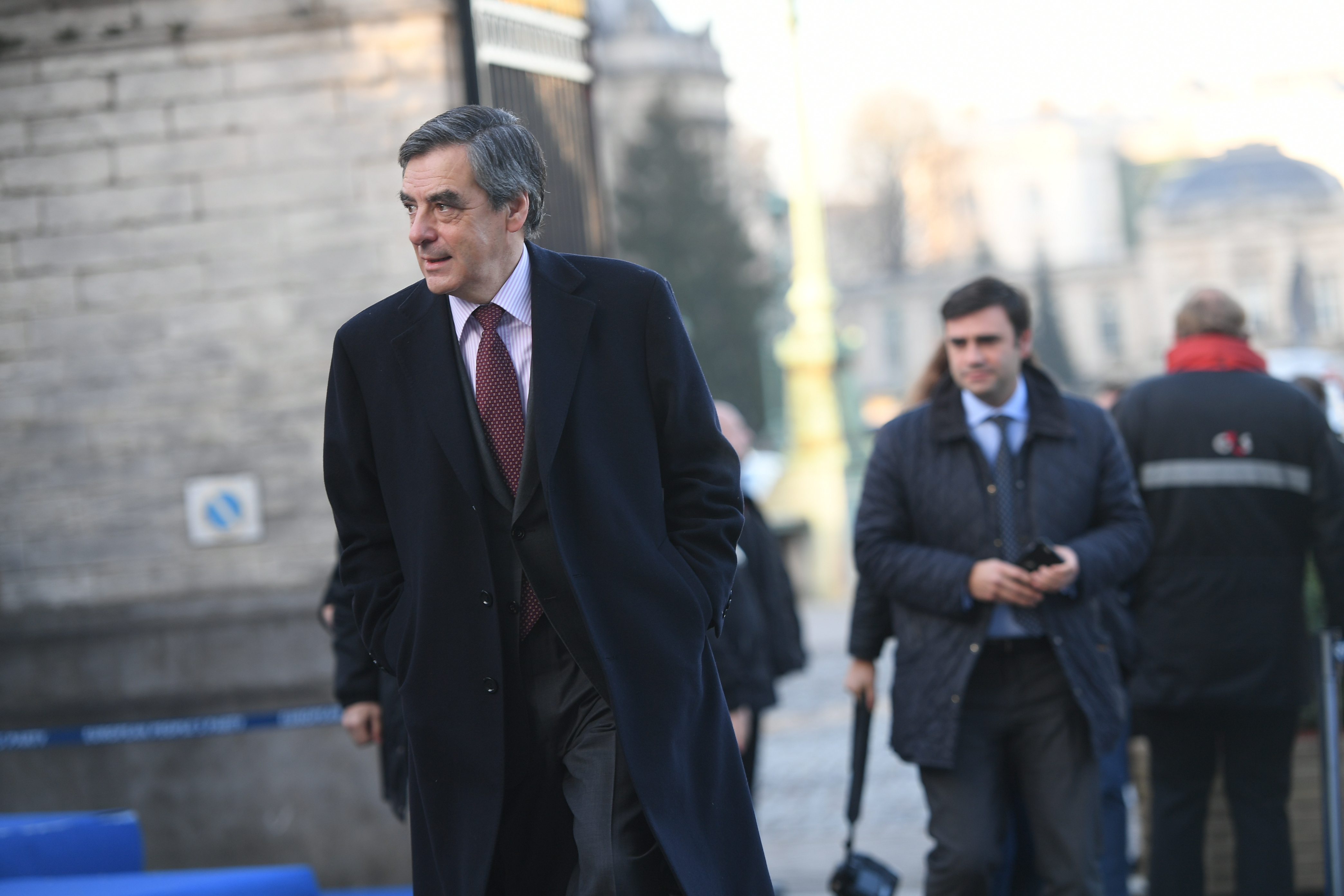 EPP Summit, Brussels, December 2016